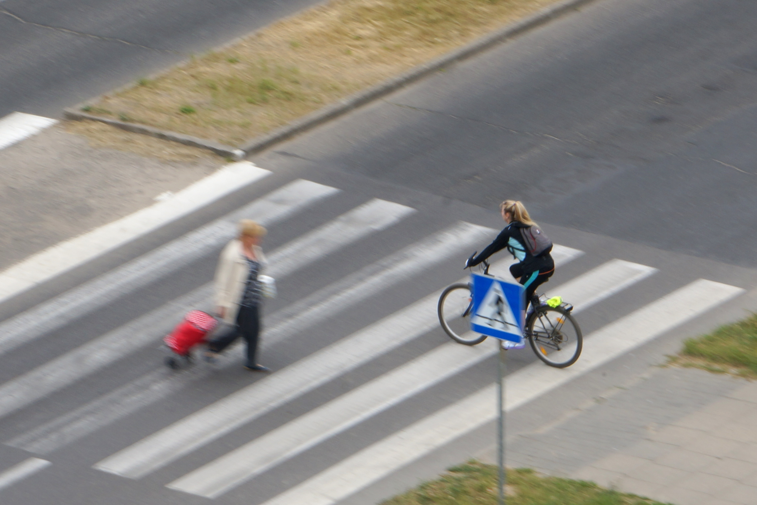 Nieuprawniony przejazd rowerzystki przez przejście dla pieszych, bez wyznaczonego przejazdu dla rowerzystów